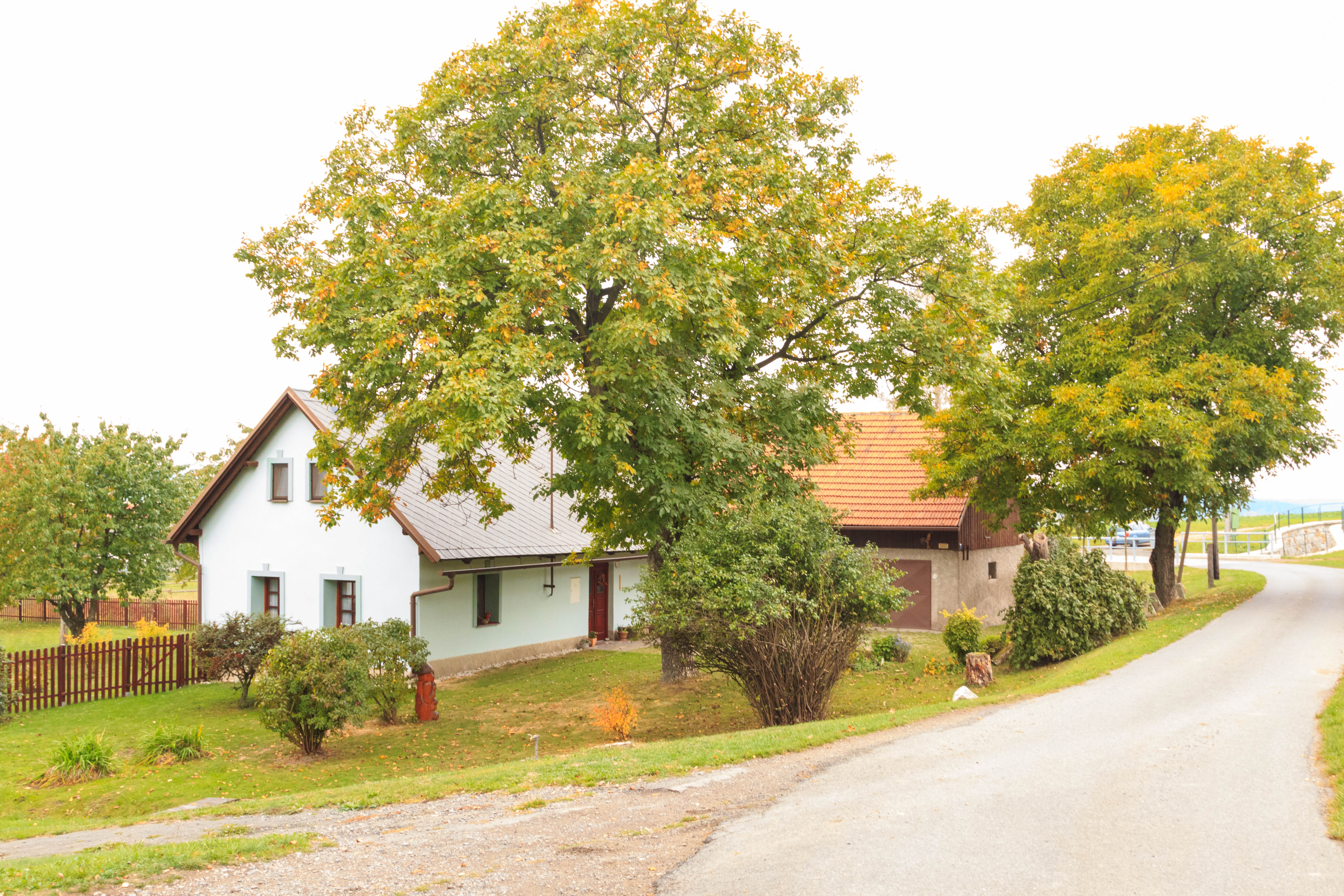 Dolní Lhotka č. 7